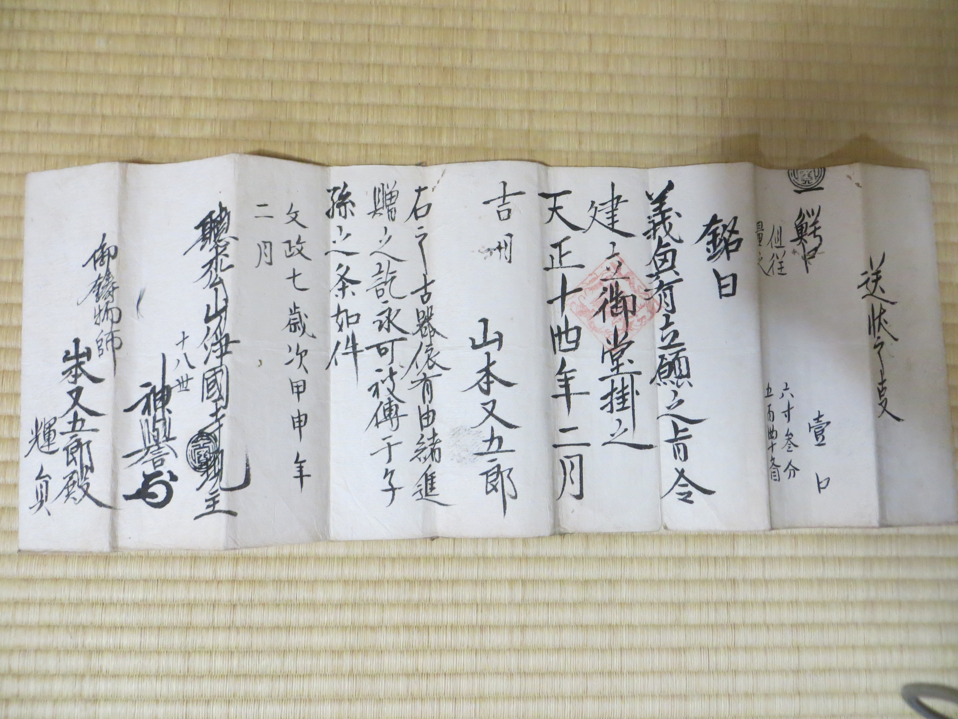 浄国事から第十三代山本又五郎が贈られた送付状